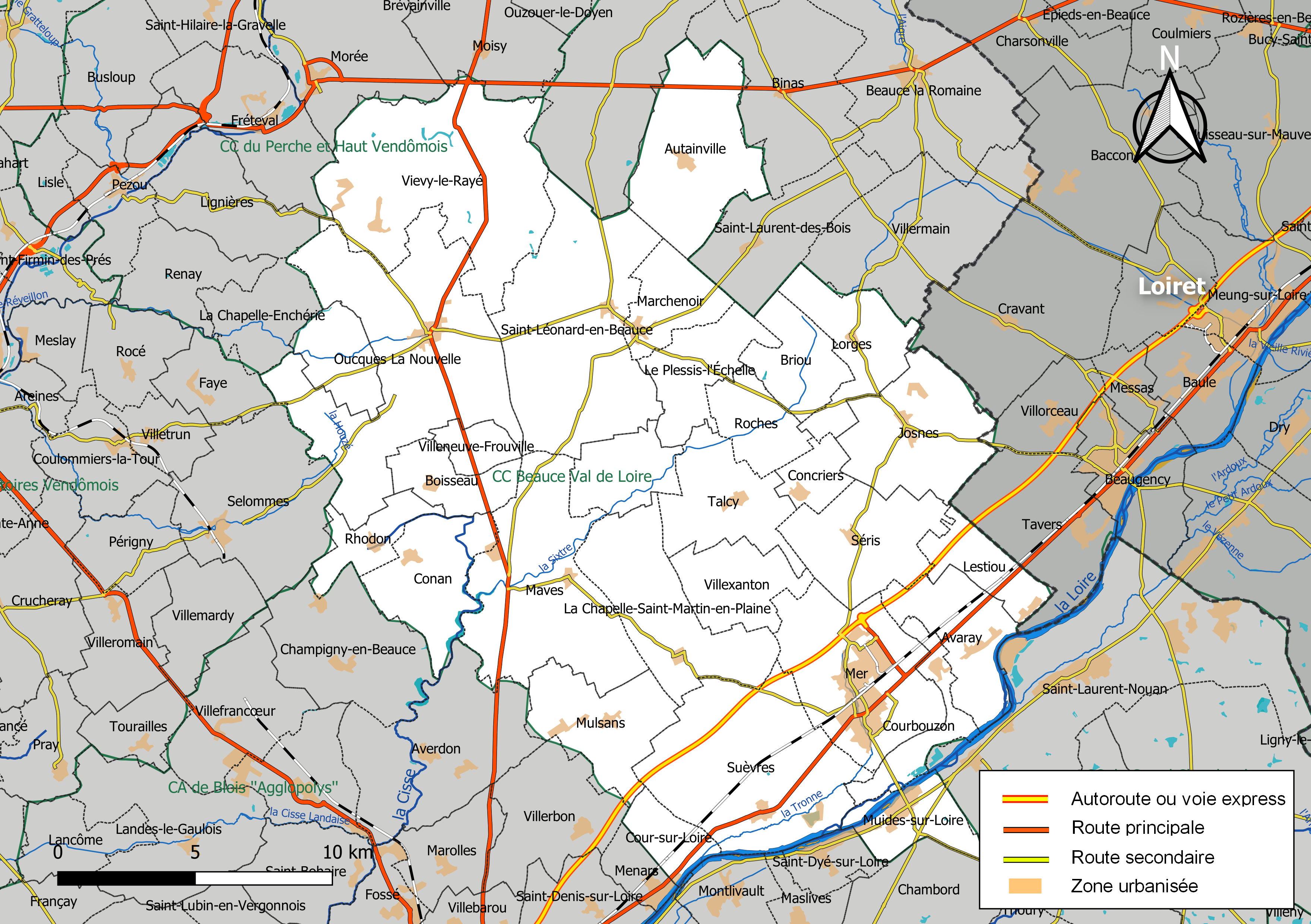 Carte de la communauté de communes Beauce Val de Loire, département de Loir-et-Cher, France. Composition au 1er janvier 2019.